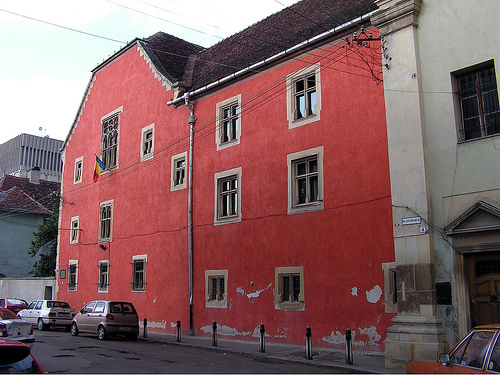 Cluj-Napoca, Claustrul dominican-franciscan (Liceu de Muzică), str. Victor Deleu nr.2-4